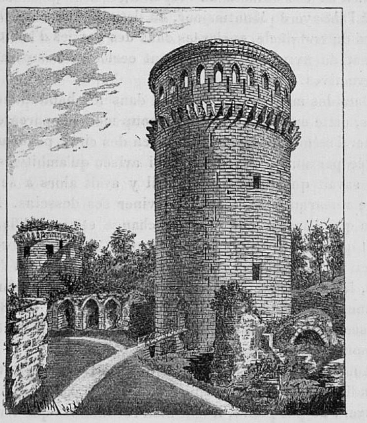 Gravure de Hotin, Auguste-Emmanuel (1850-1910) in Les arts de l'ameublement. Les styles par Henry Havard, C. Delagrave (Paris) 1891-1897